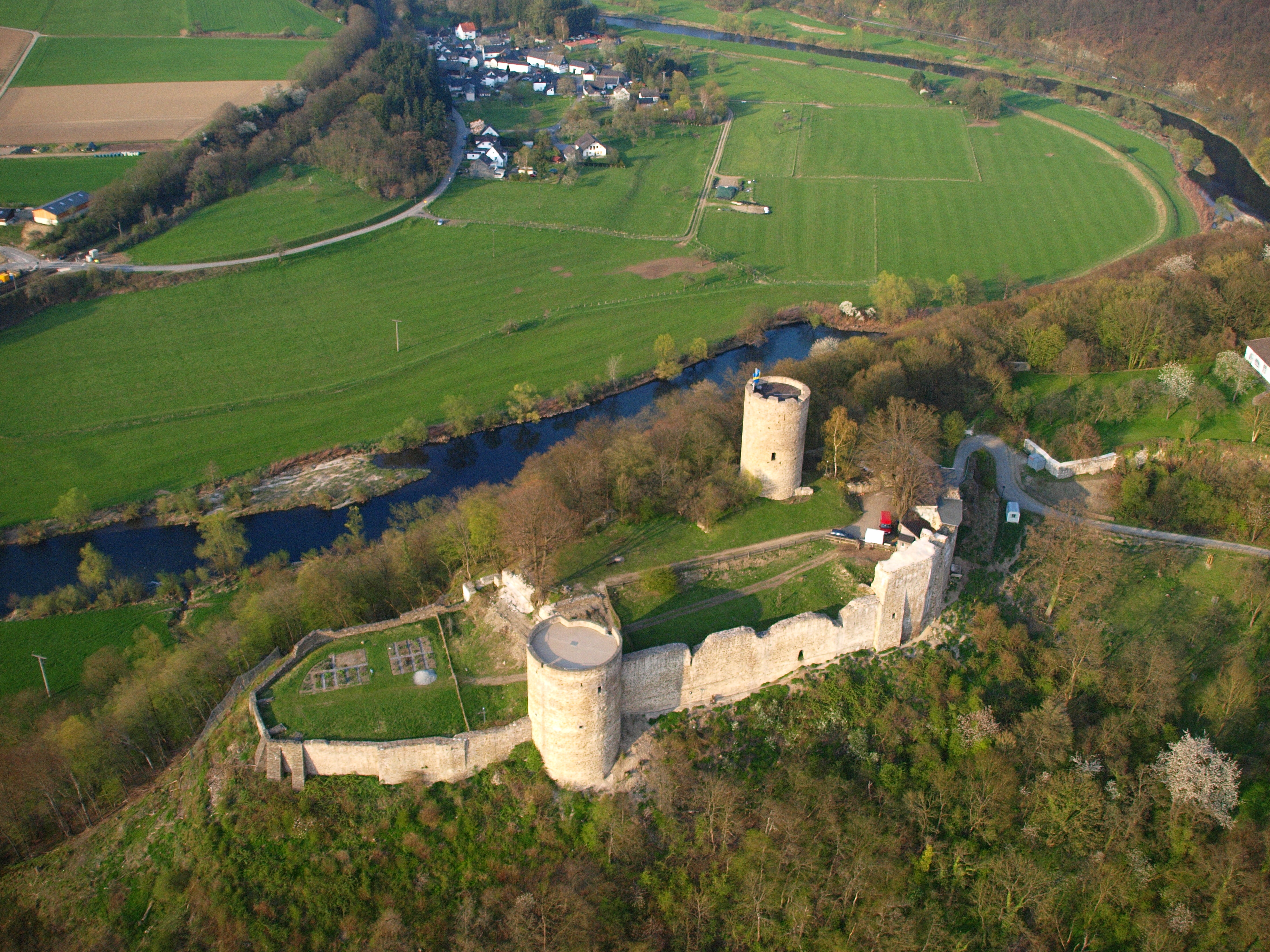 Burg Blankenberg an der Sieg.